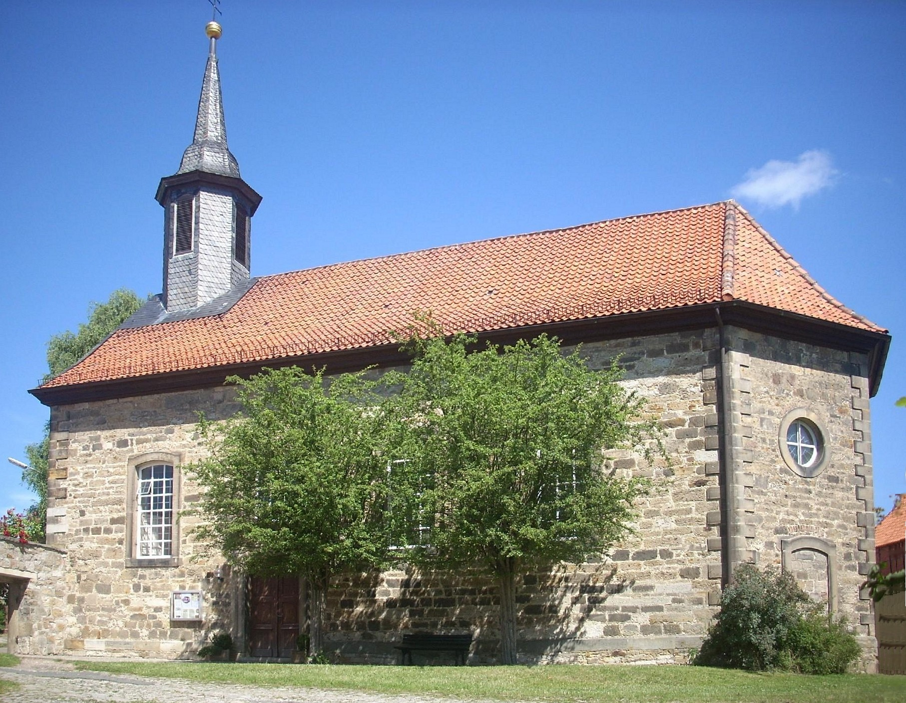 Ehemalige Torkapelle St. Cosmas und Damian, jetzt evang. Kirche